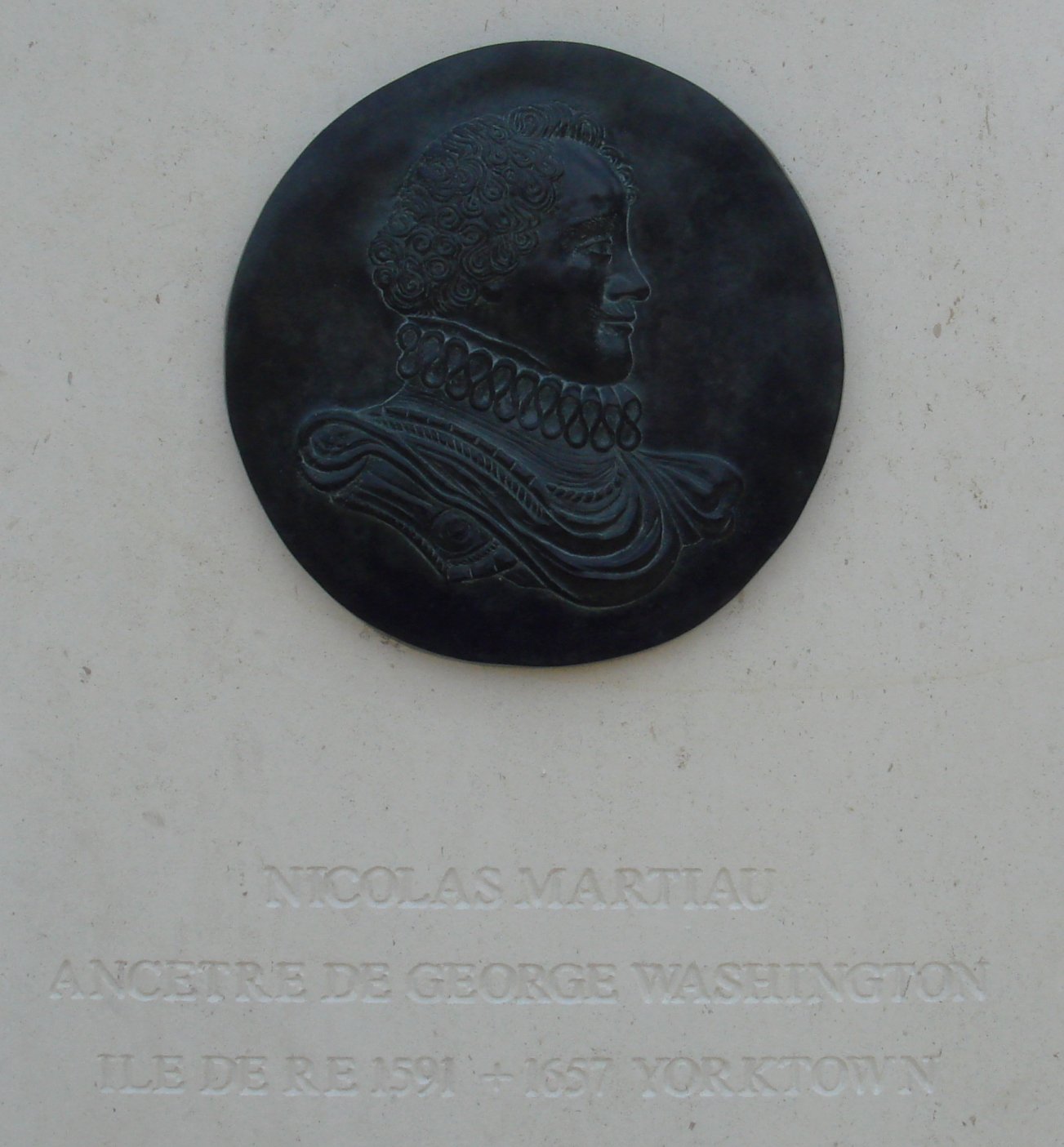 Nicolas Martiau